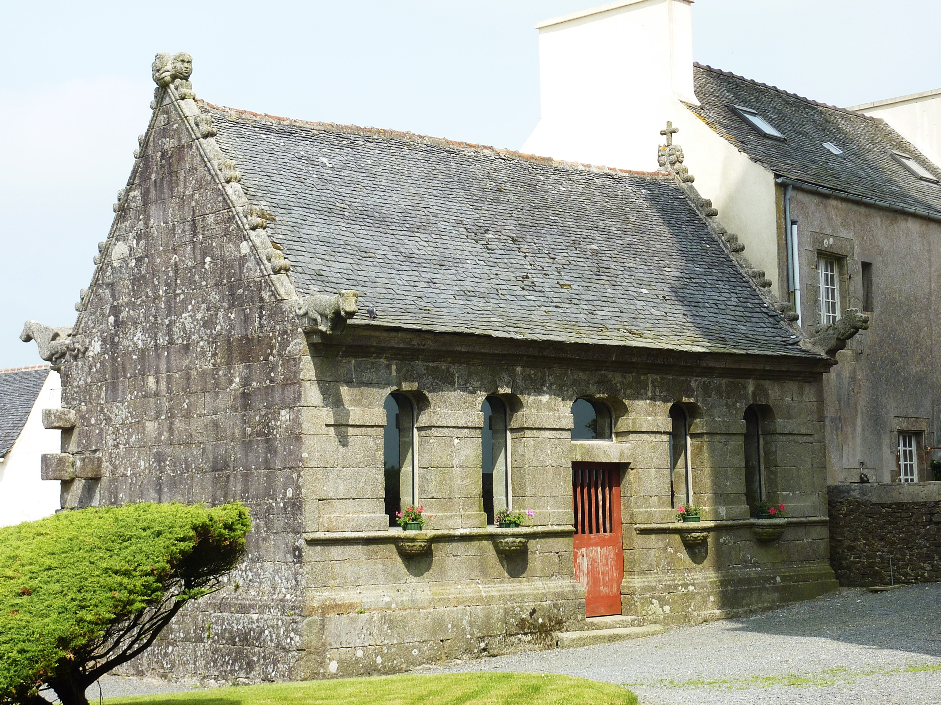 Commana Enclos paroissial L'ossuaire 1677-1687